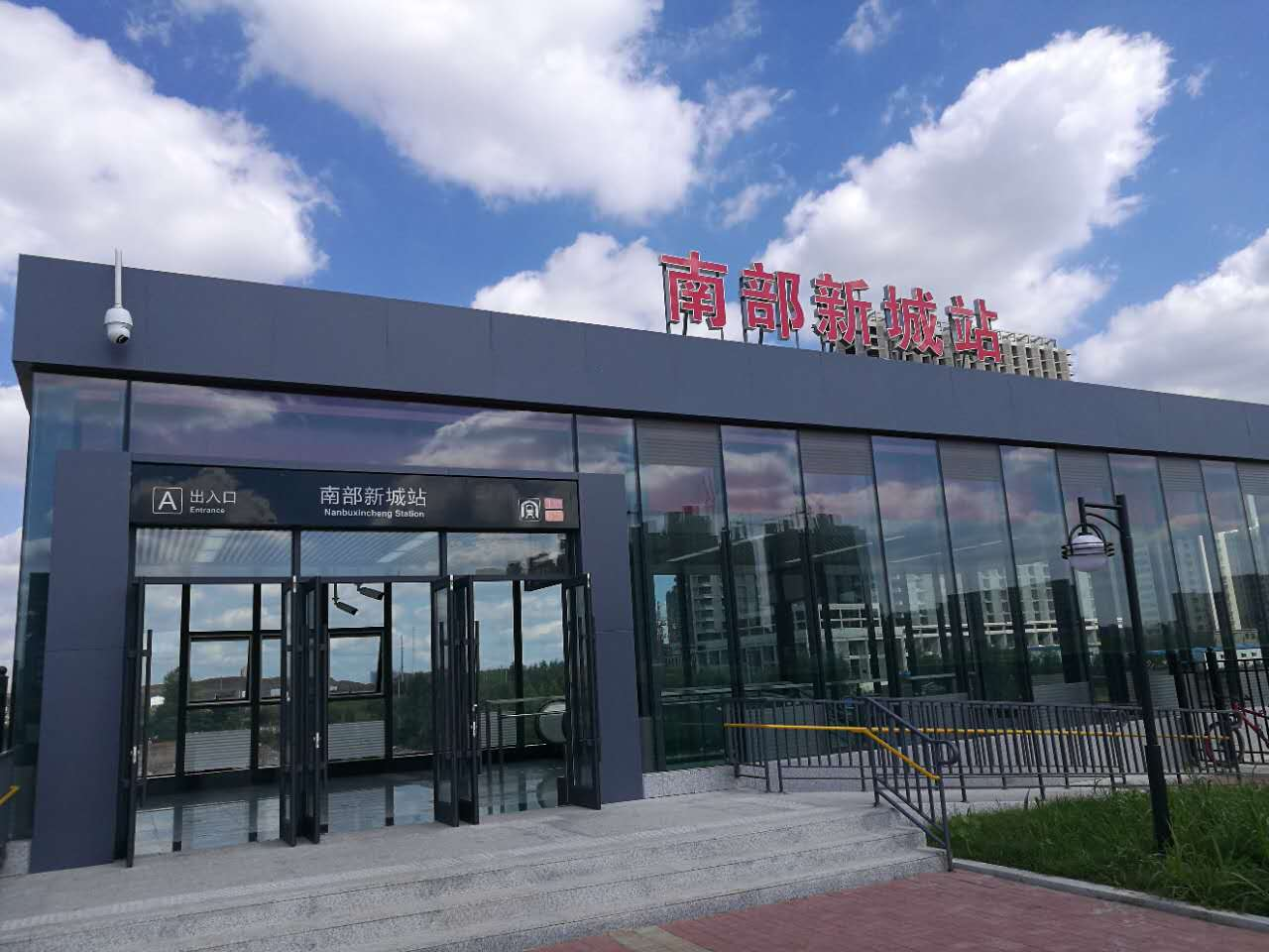 长春地铁南部新城站出入口